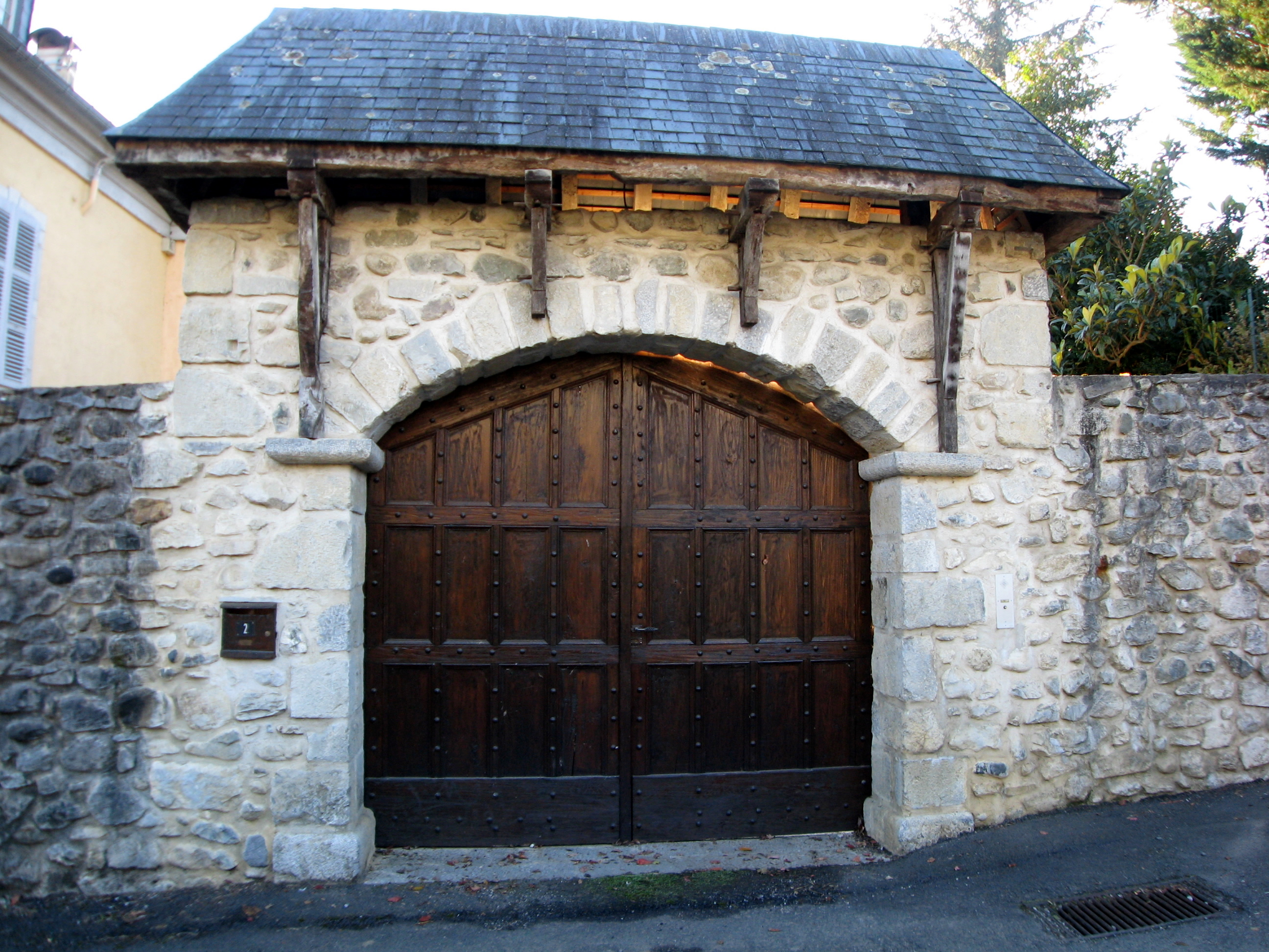 Très joli portail à Bescat (Pyrénées-Atlantiques) (Pyrénées).